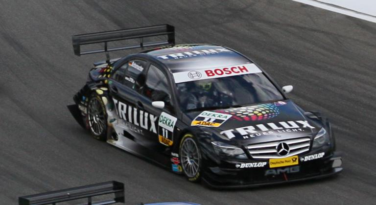 Image:DTM race 2008 Hockenheim amk.jpg